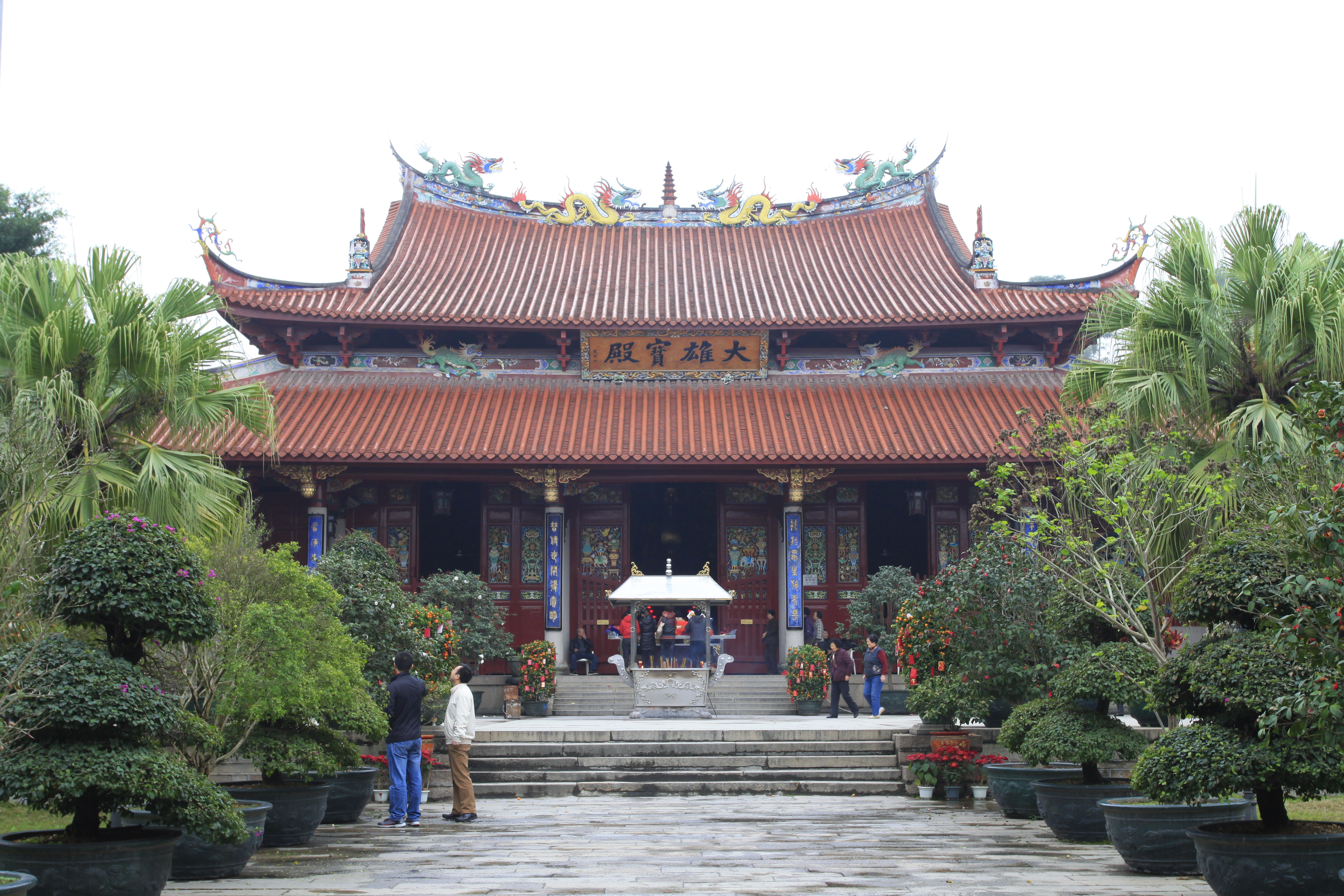 南山寺，位于中国福建省漳州市，是漳州市文物保护单位。